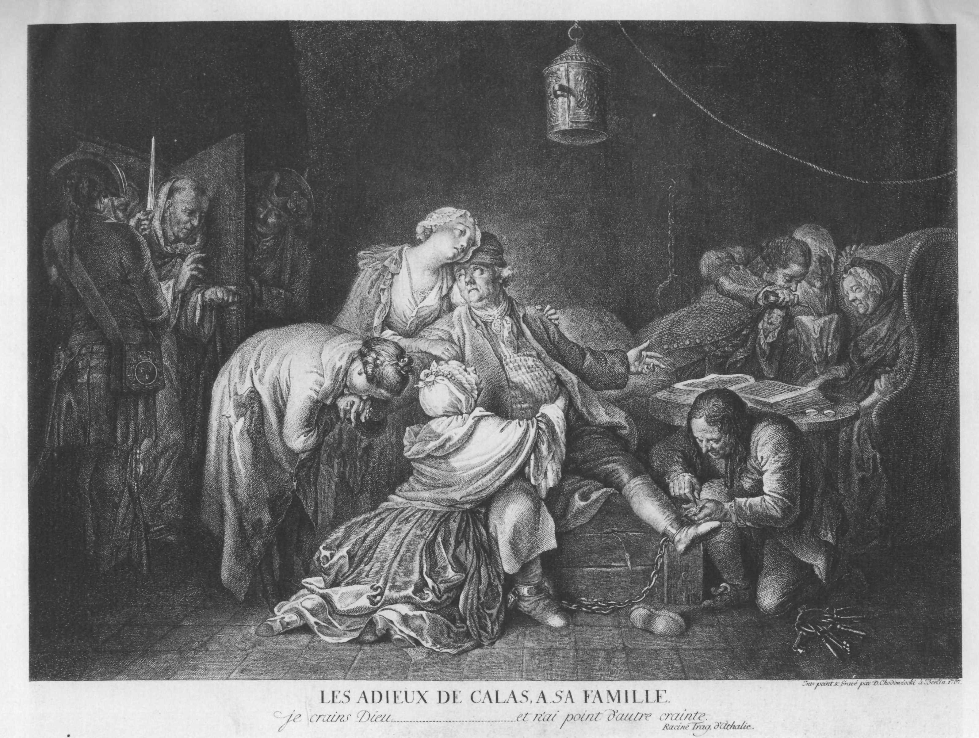 Der grosse Calas. In einem gewölbten, durch eine herabhängende Laterne beleuchteten Kerker sitzt Calas in der Mitte nach rechts gewendet und tröstet seine Kinder, von denen die eine Tochter links zu seinen Füssen knieend ihn umfasst, währende die zweite, welche neben ihm steht, ihn trauernd umfassend, ihr Haupt an seinen Kopf lehnt; vor dieser der Sohn, die ausgestreckte rechte Hand des Vaters küssend, dessen linke Hand nach der Mutter hinweist, um diese der Kinder fernere Liebe zu empfehlen. Rechts kniet der Kerkermeister und öffnet an dem rechten Fuß des unglücklichen Opfers der Justiz das Schloss der Kette; rechts nach hinten sitzt die ohnmächtige Gattin in einem Korbsessel. Der Freund der Familie, der junge Lavaysse, giesst stärkendes Wasser auf ein Tuch, welches die alte treue Magd in der Hand hält. Links zur geöffneten Kerkerthüre, an deren Seiten zwei Soldaten stehen, treten zwei Mönche herein. (Beschreibung lt. Quelle)